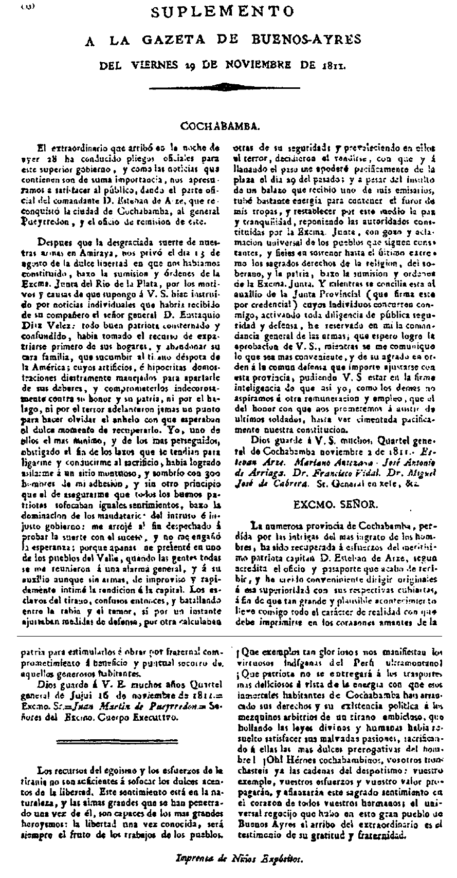 Segunda sublevación de Cochabamba